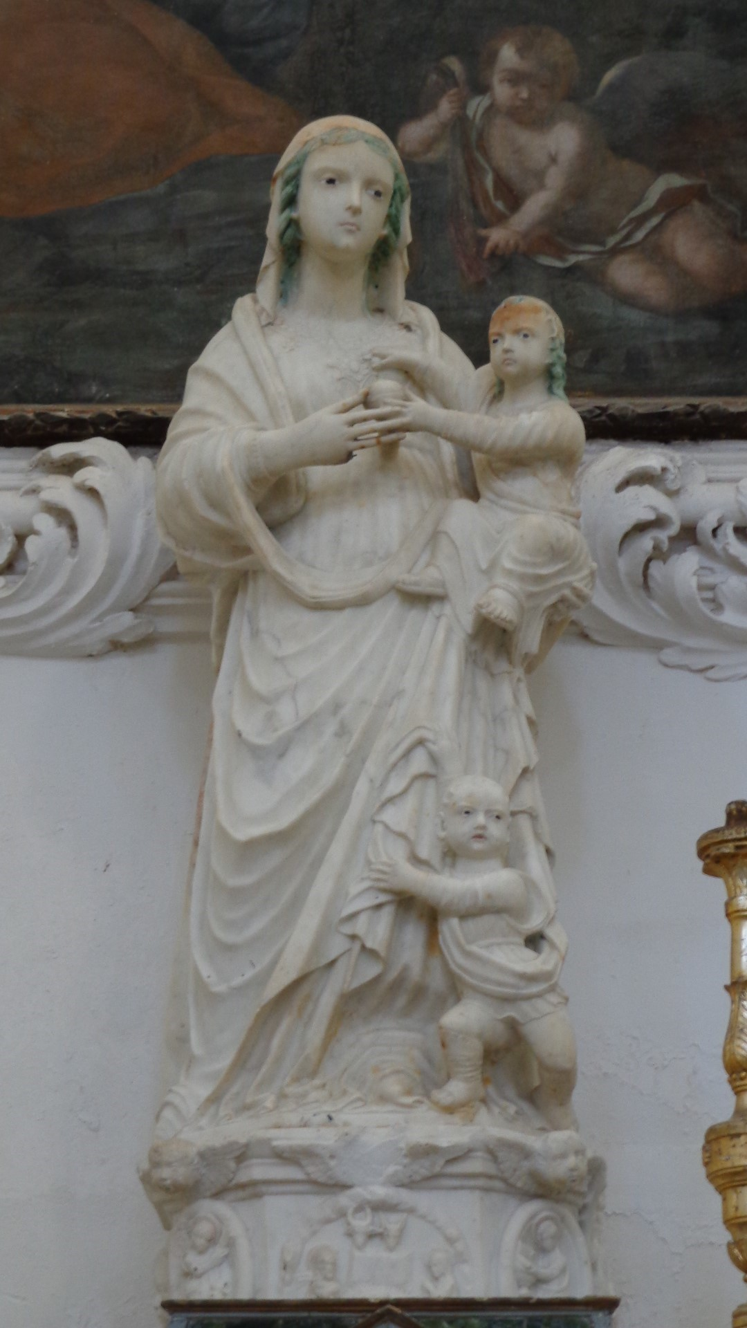 Scultura Vergine Maria